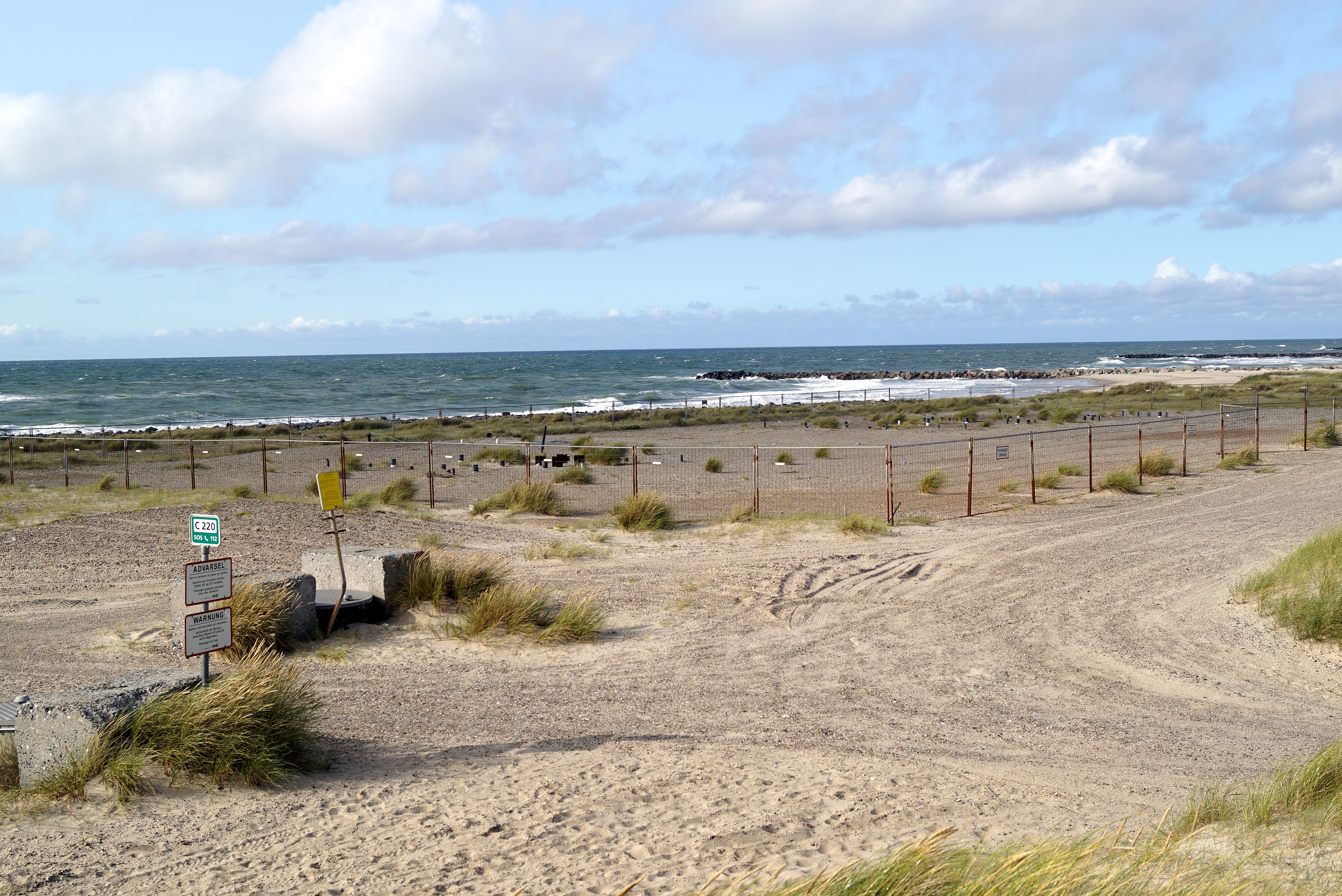 Kemikaliedepotet ved Harboøre Tange